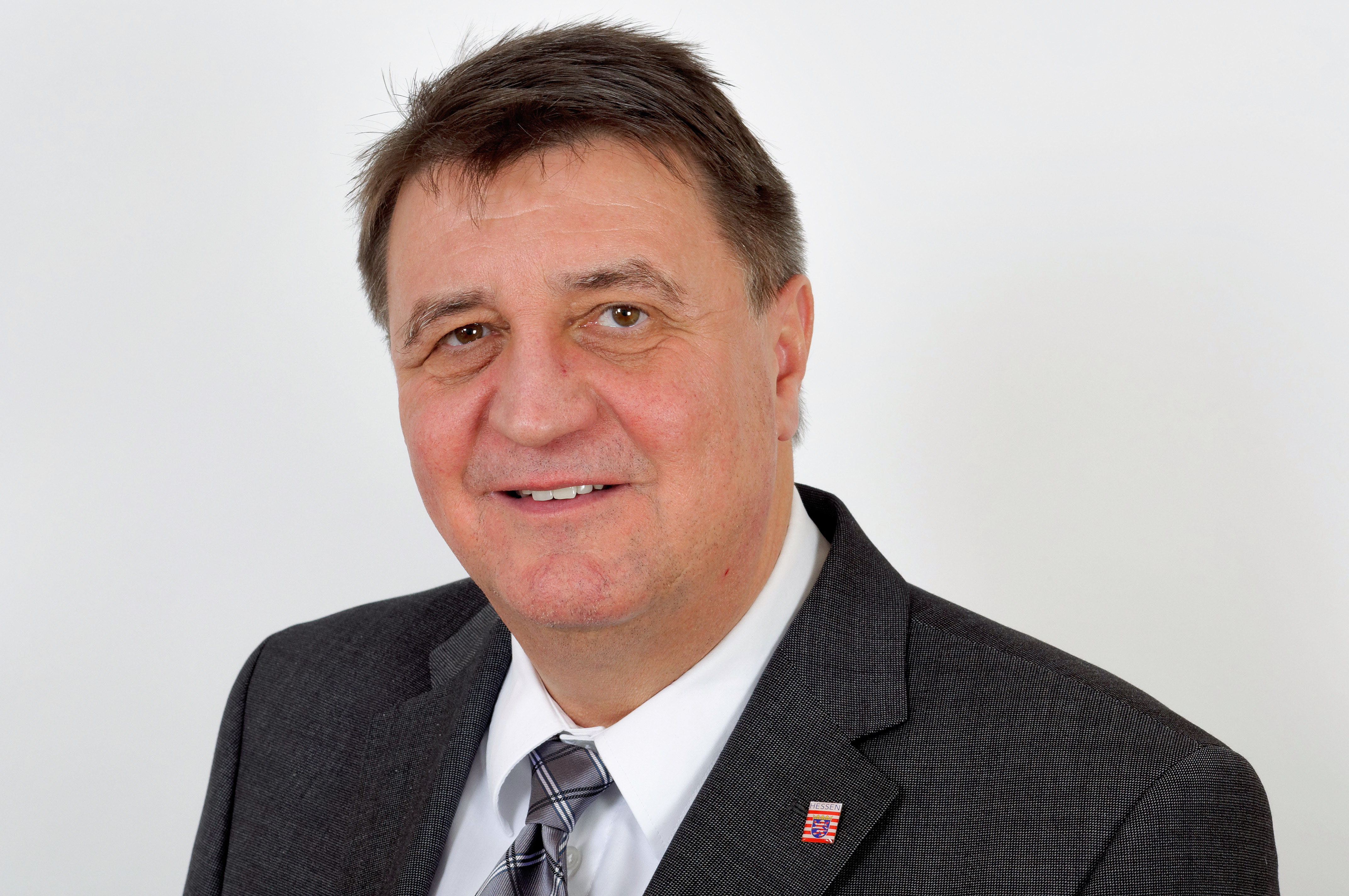 Landtagsprojekt Hessen